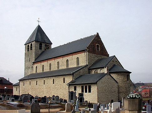 Kerk Sint Pieter's Banden te Bertem